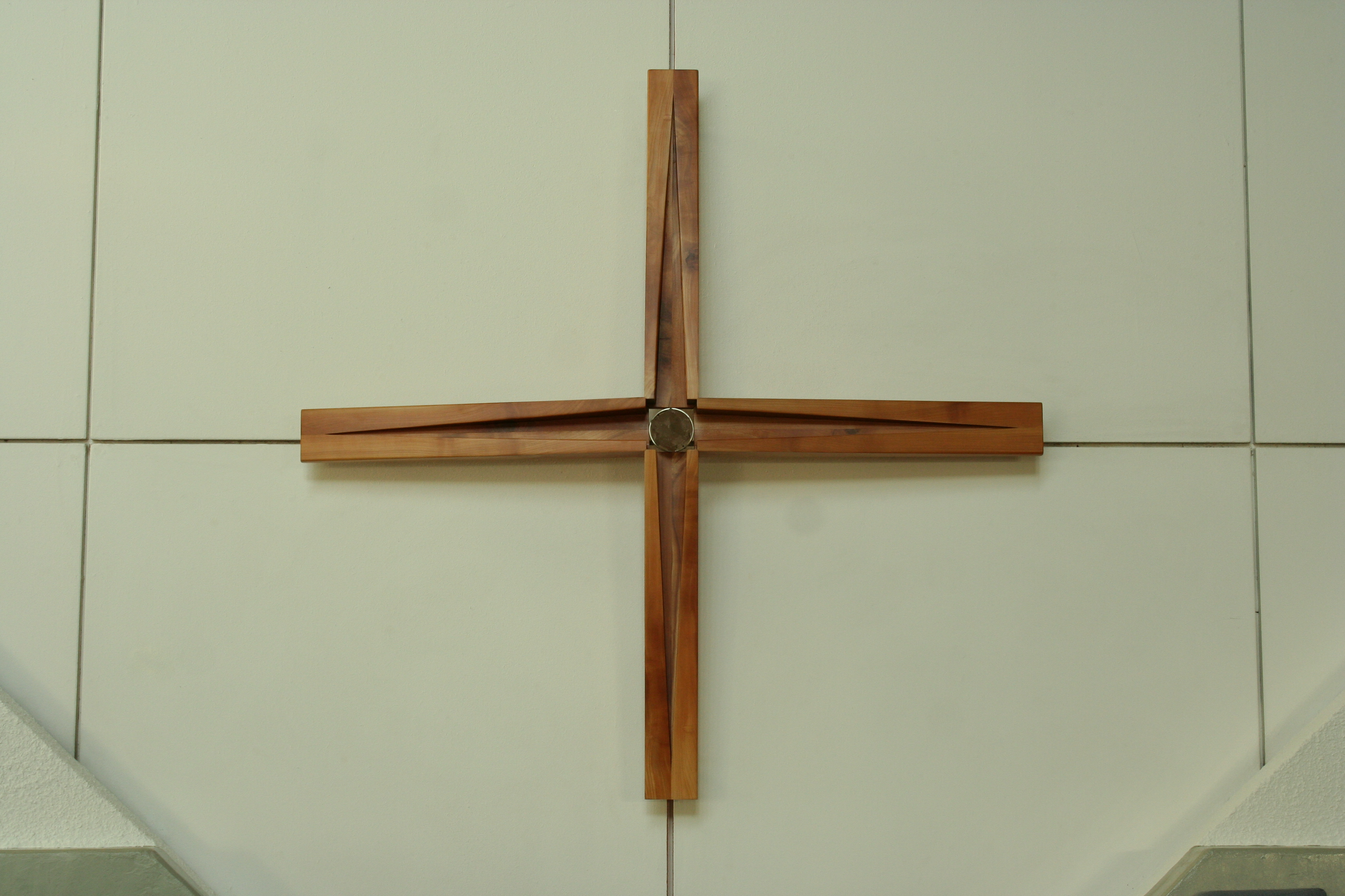 Römisch-katholische Kirche Bruder Klaus Volketswil, Gestaltung von Primo Lorenzetti